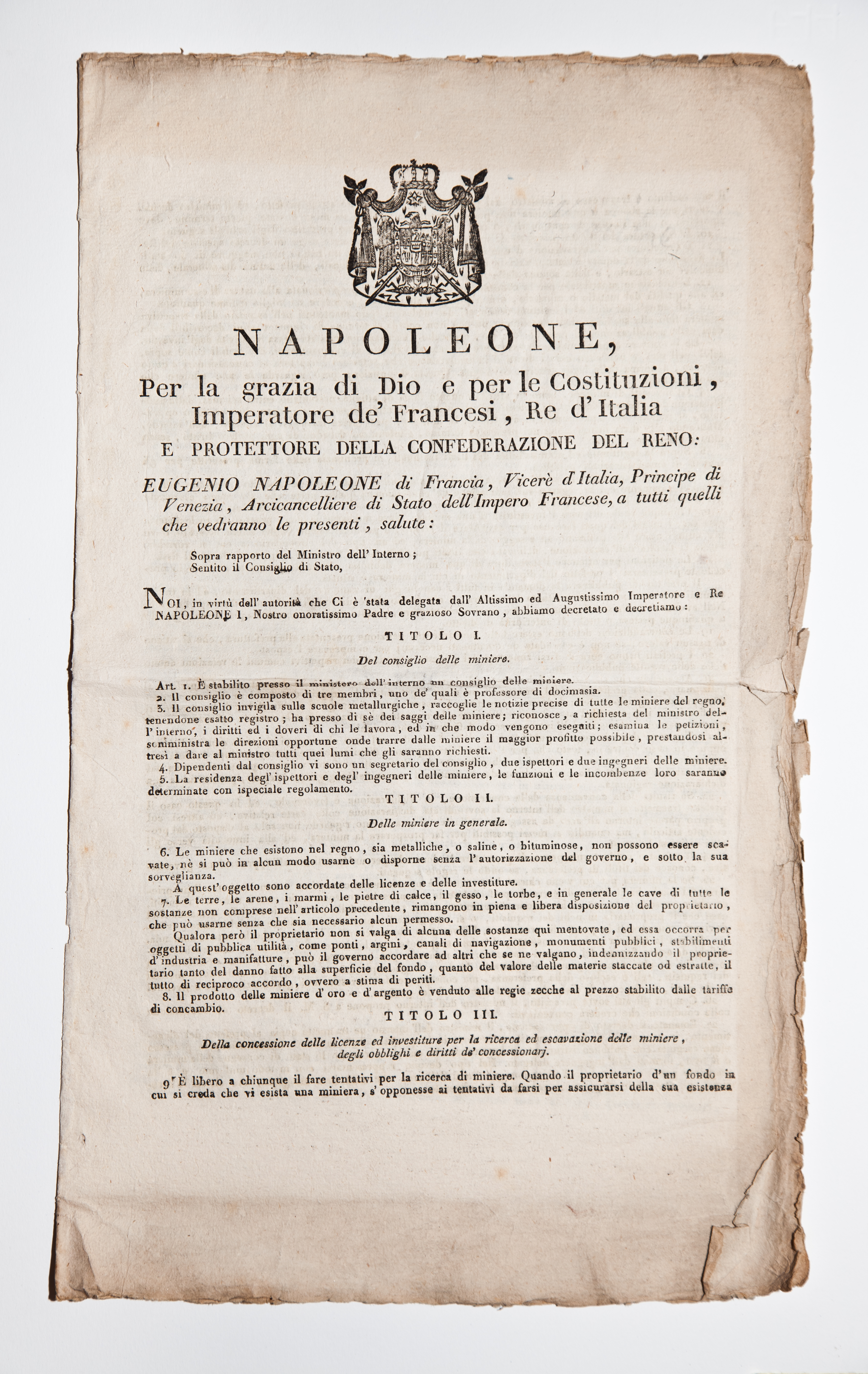 Archivio Pietro Pensa, Ferro e miniere, Avvisi e decreti 9.8.1808